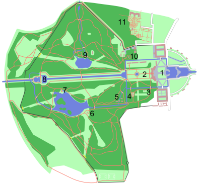 Nymphenburger Park - Vorschaubild